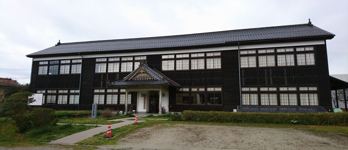 Hikawa Kankyō Gakushū Center